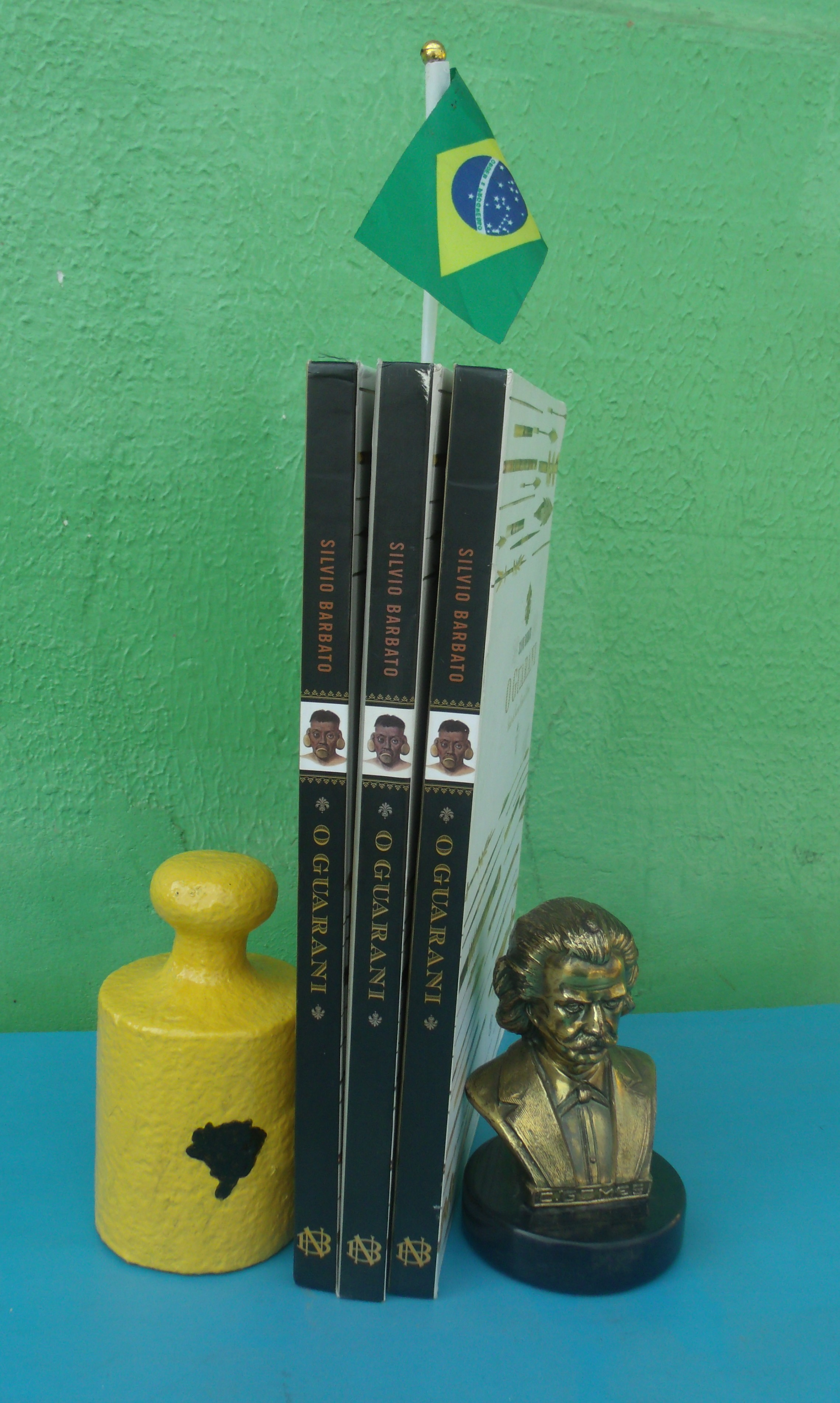 Publicação sobre o Guarani, composição do maestro brasileiro, Carlos Gomes, editada com patrocínio do Ministério da Cultura do Brasil.